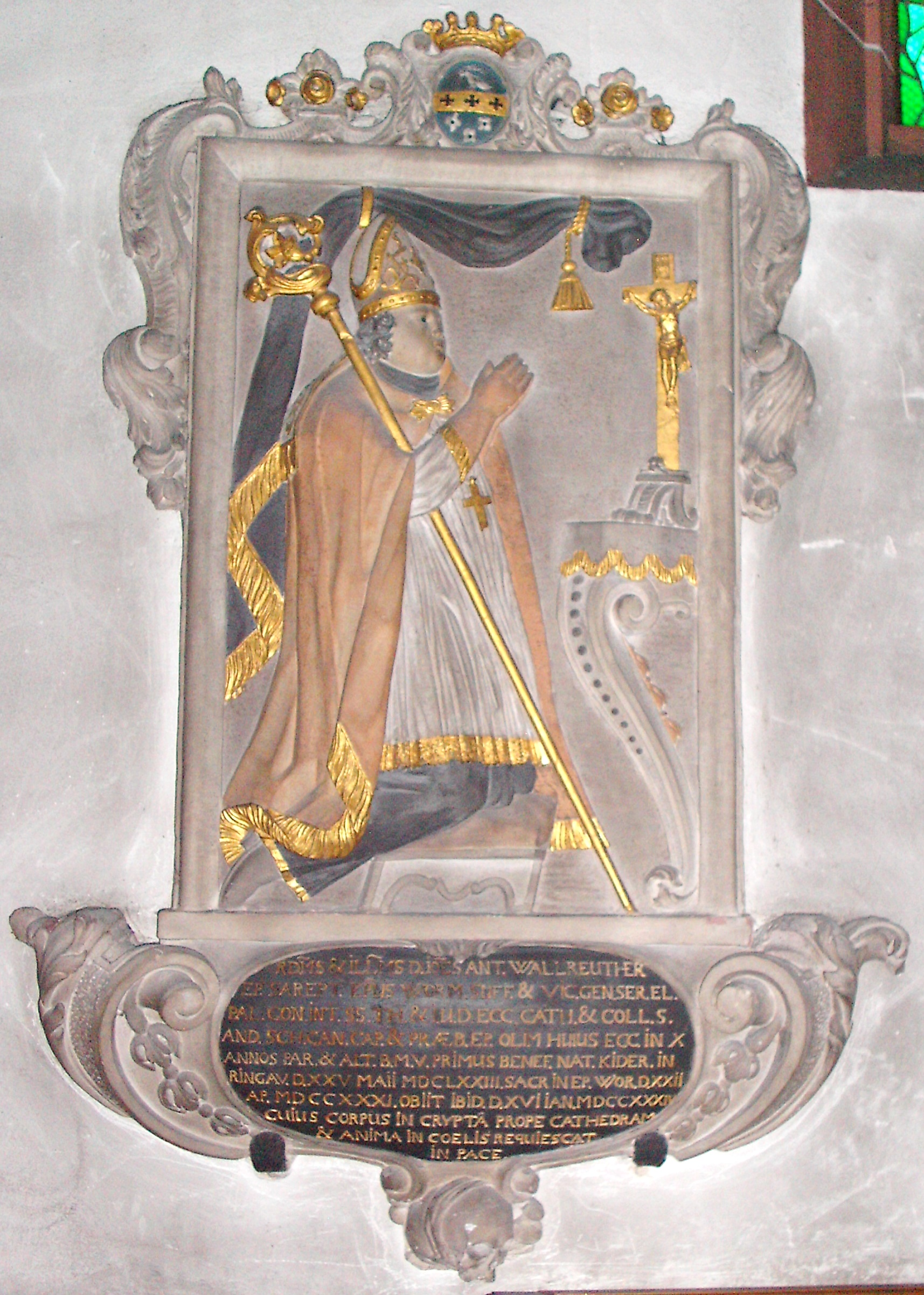 Johann Anton Wallreuther, Weihbischof von Worms (+1734), Epitaph, Worms, Liebfrauen